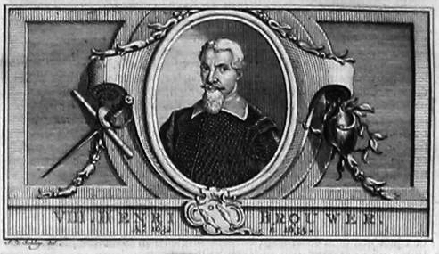 Gouverneur-Generaal Hendrik Brouwer